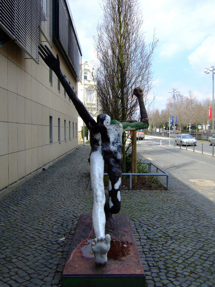 Skulptur von Wolfgang Mattheuer: Jahrhundertschritt vor dem Haus der Geschichte in Bonn. Material: Stahl (Abguss) – Original: Bronze